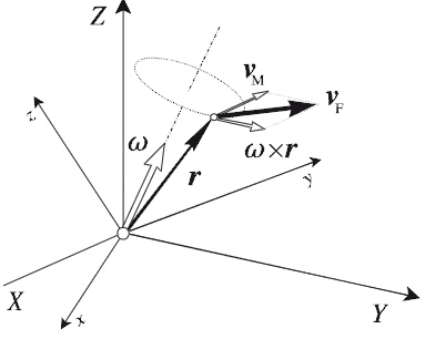 Movimiento relativo. Velocidad absoluta y velocidad relativa.